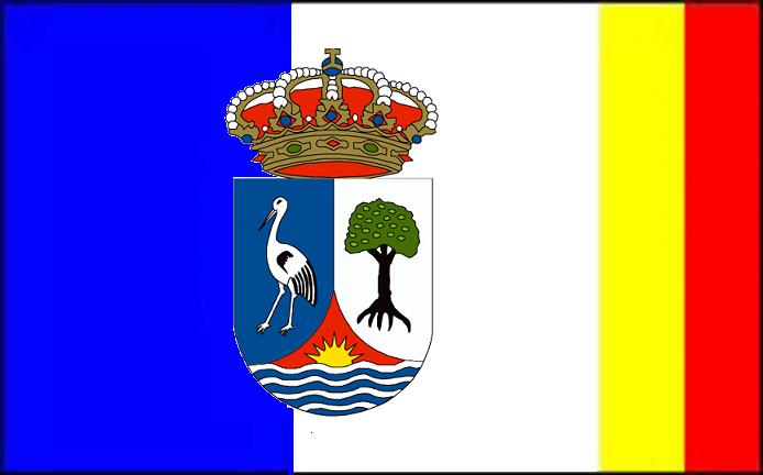 Bandera de Las Rozas